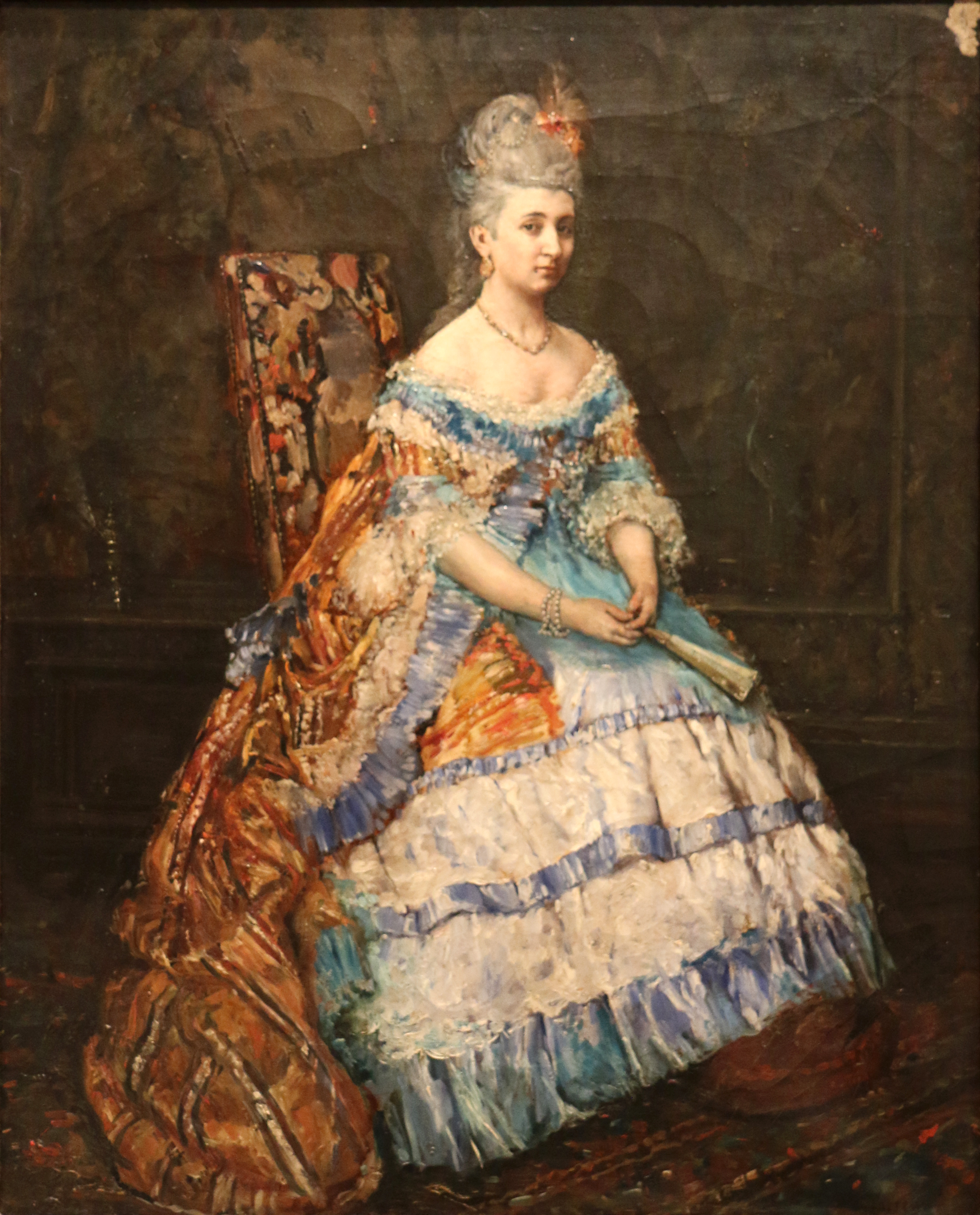 Portrait de Claire Charles-Roux née Canaple. Tableau de Stanislas Torrents, huile sur toile. Musée Vouland, Avignon